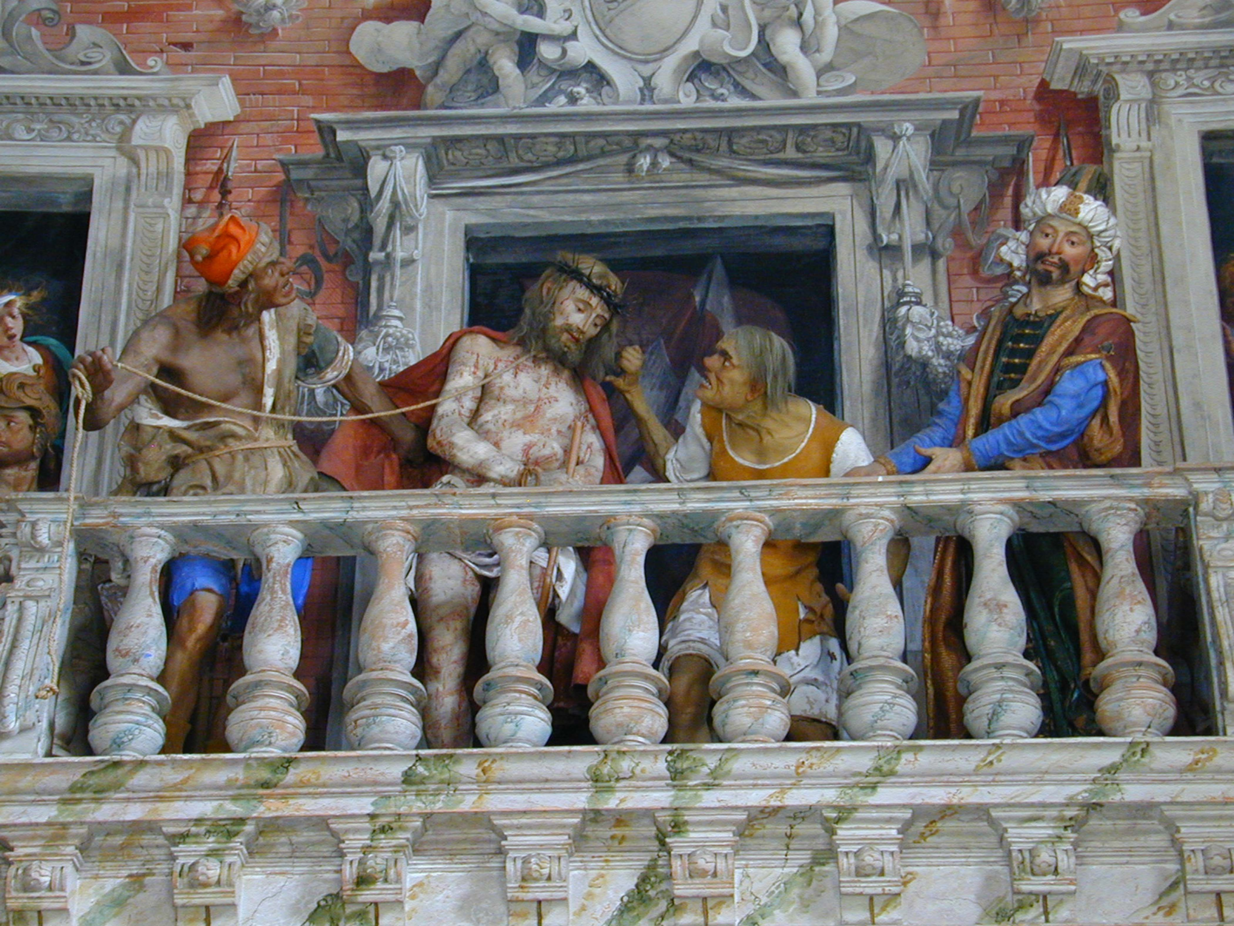 Sacro Monte di Varallo. Polychrome clay statues and frescos, Chapel XXXIII, Ecce Homo, statues by Giovanni d'Enrico, 1608-9